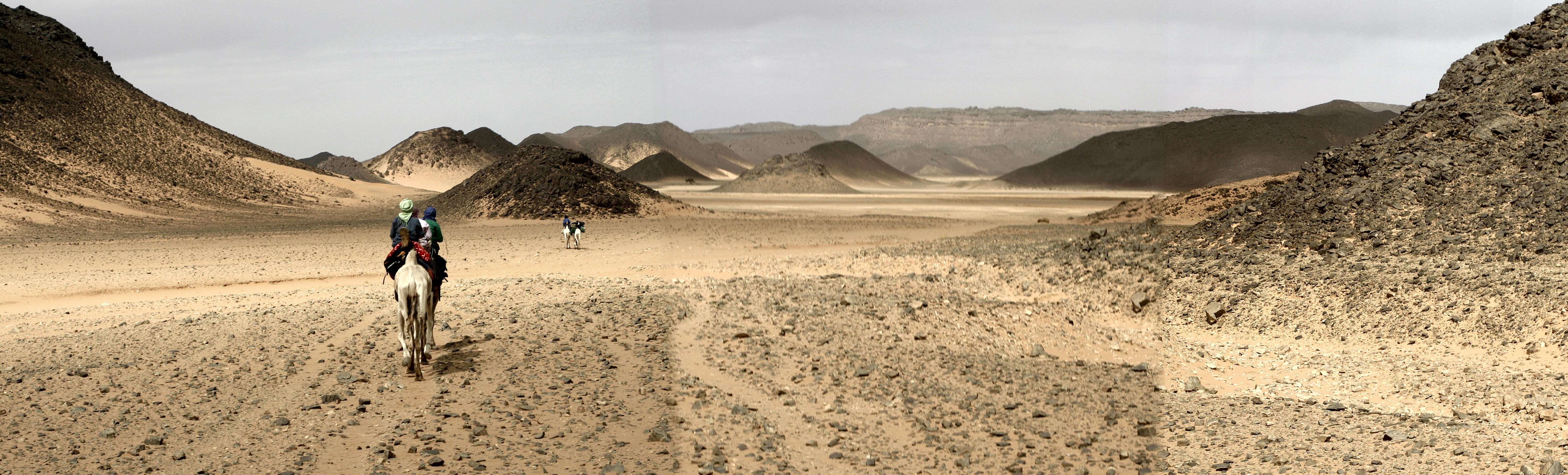 Adrar Ahnet in Algerien